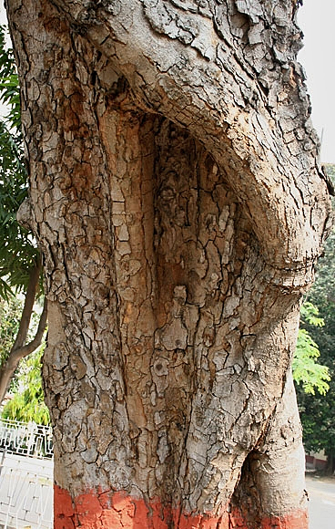 Sausage Tree Kigelia africana in Kolkata, West Bengal, India.